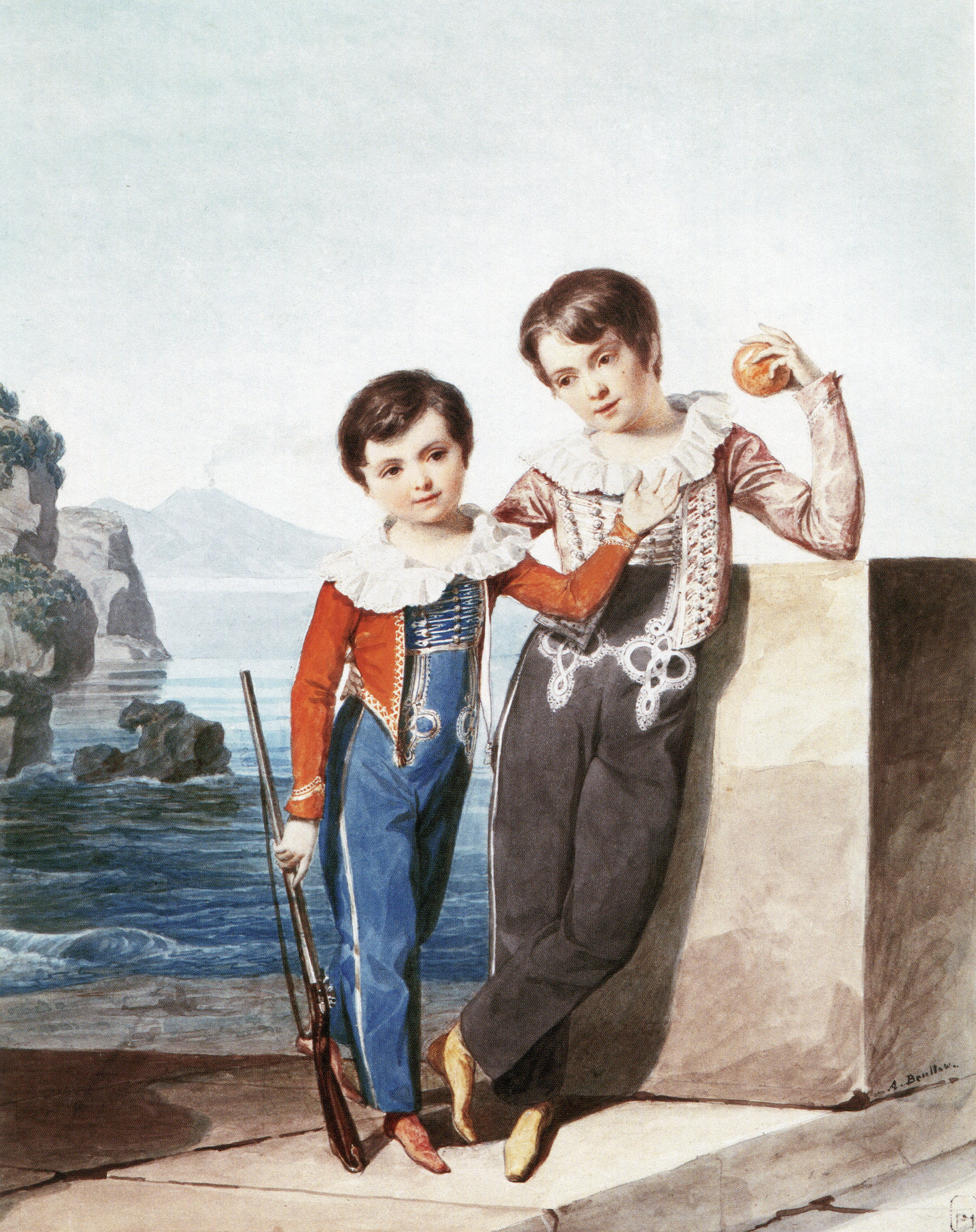 Андрей Павлович и Петр Павлович Шуваловы